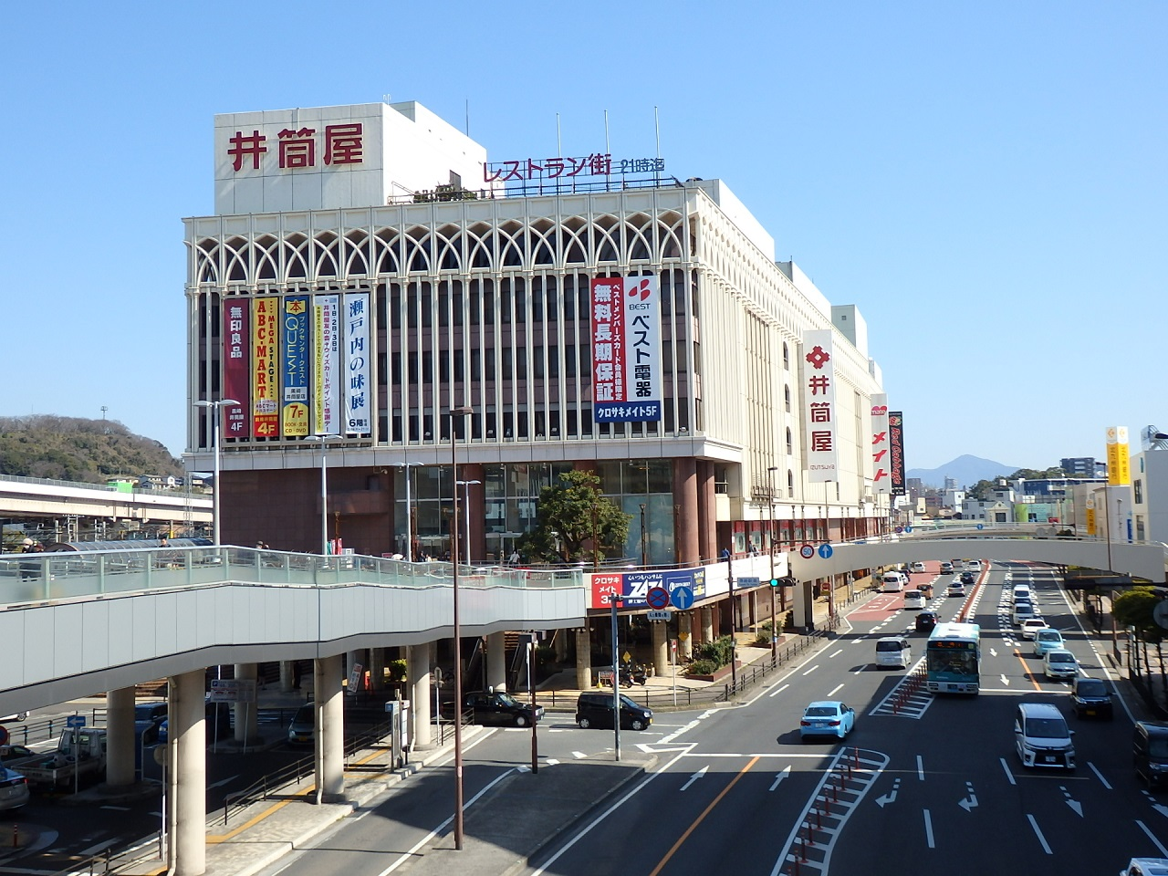 2017年2月、井筒屋黒崎店を撮影。